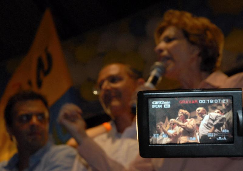 Porto Alegre (RS) - Câmera grava discurso de candidata tucana ao governo do Rio Grande do Sul, Yeda Crusius, ao lado do candidato à Presidência Geraldo Alckmin.